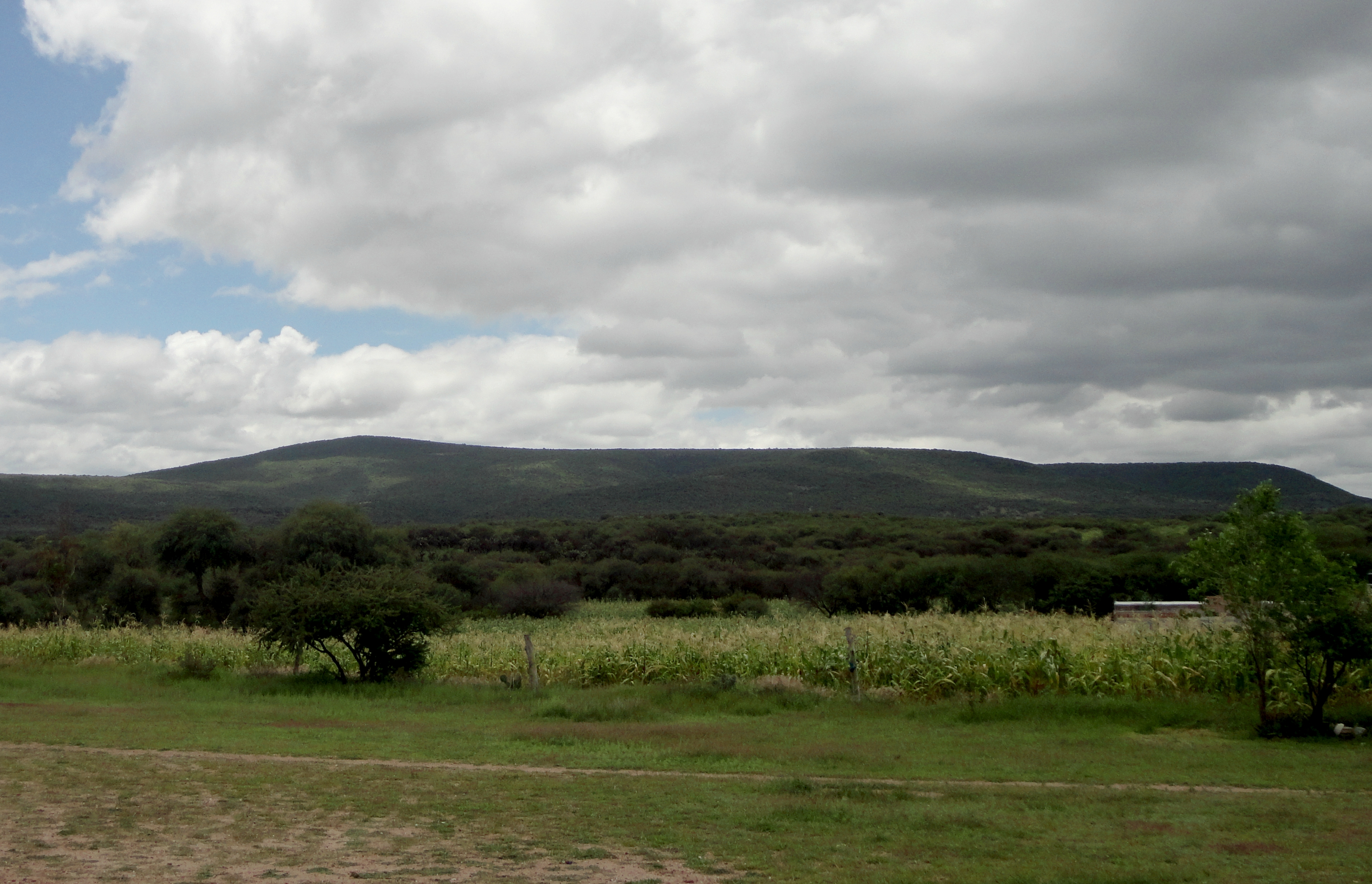 Mesa El Gusano - Dolores Hidalgo, Guanajuato, México.